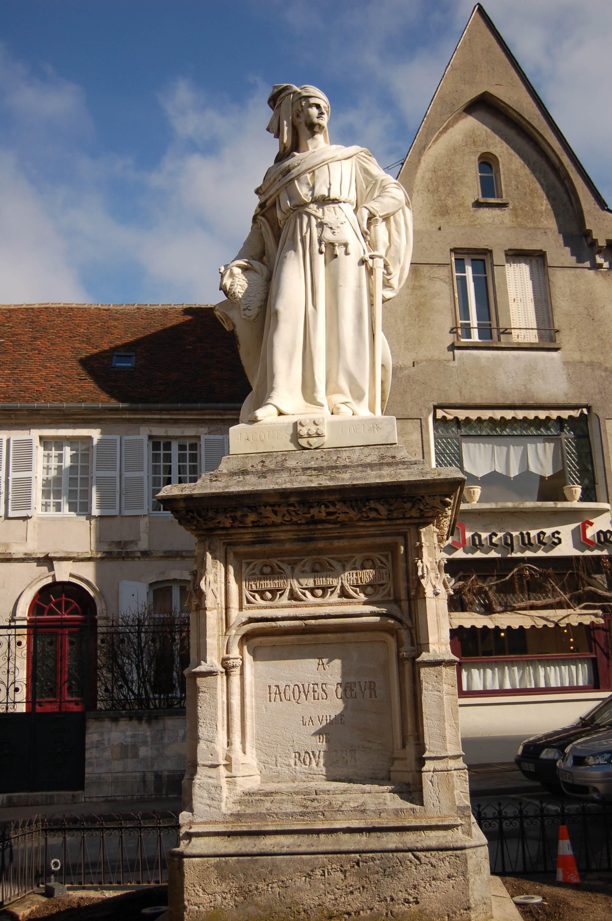 Statue de Jacques Coeur à Bourges